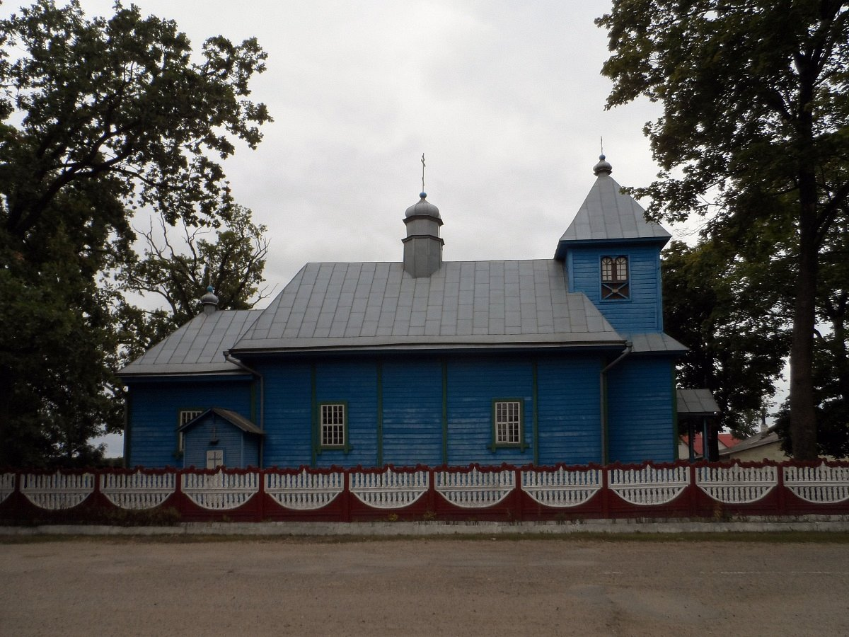 Дарапеевічы. Свята-Раства-Багародзіцкая царква